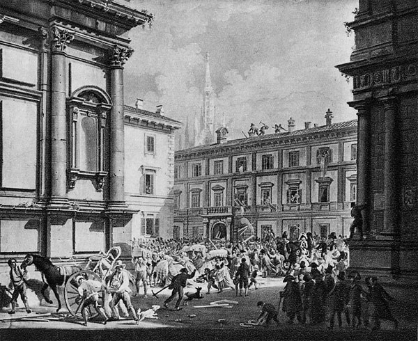 Piazza San Fedele durante l'assalto al palazzo del ministro Prina, 20 aprile 1814